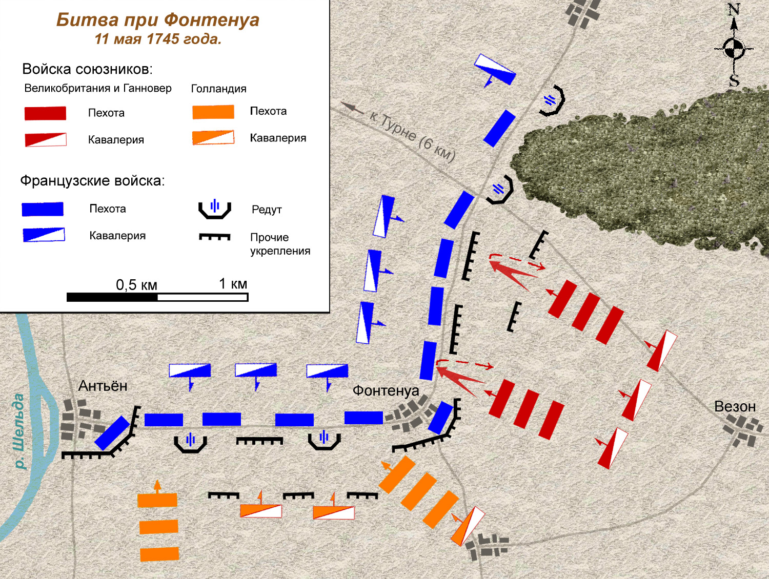 План битвы при Фонтенуа 1745 г.